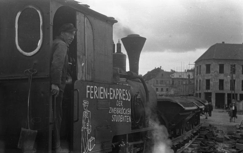 ca.1946/1947 Mainzer Studenten helfen beim Wiederaufbau in Zweibrücken